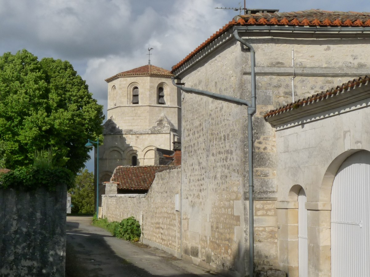 Eglise de St-Saturnin, Charente, France